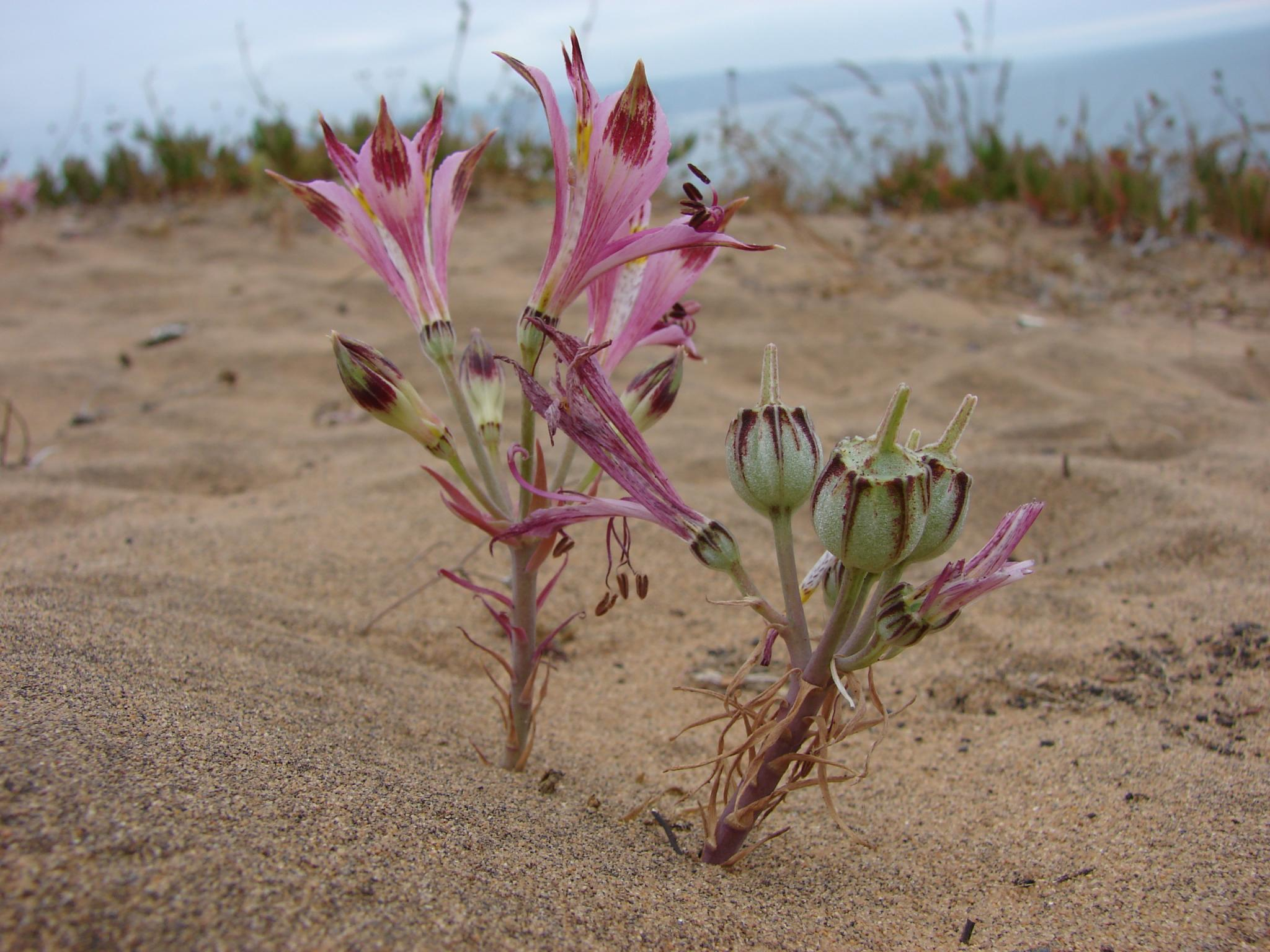 Dunas de Concon